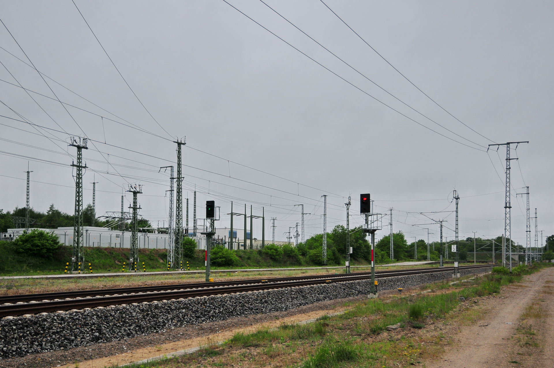 Umspannwerk (Bahnstrom-Umformerwerk) in Adamsdorf an der Lloydbahn, Mecklenburg Vorpommern